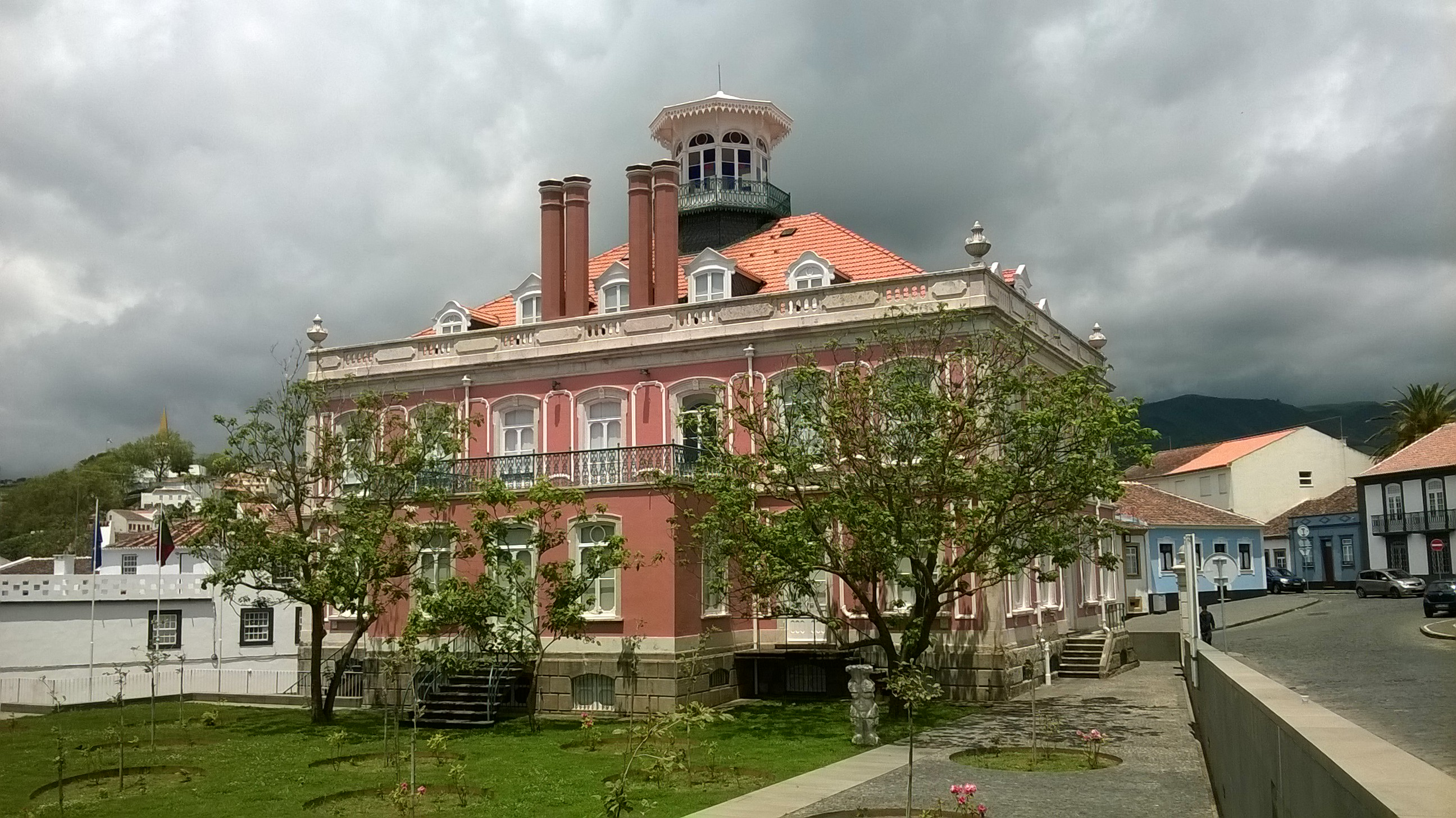 Palacete Silveira e Paulo, freguesia de Nossa Senhora da Conceição, concelho de Angra do Heroísmo, ilha Terceira, Região Autónoma dos Açores, Portugal: vista da fachada posterior e do jardim.